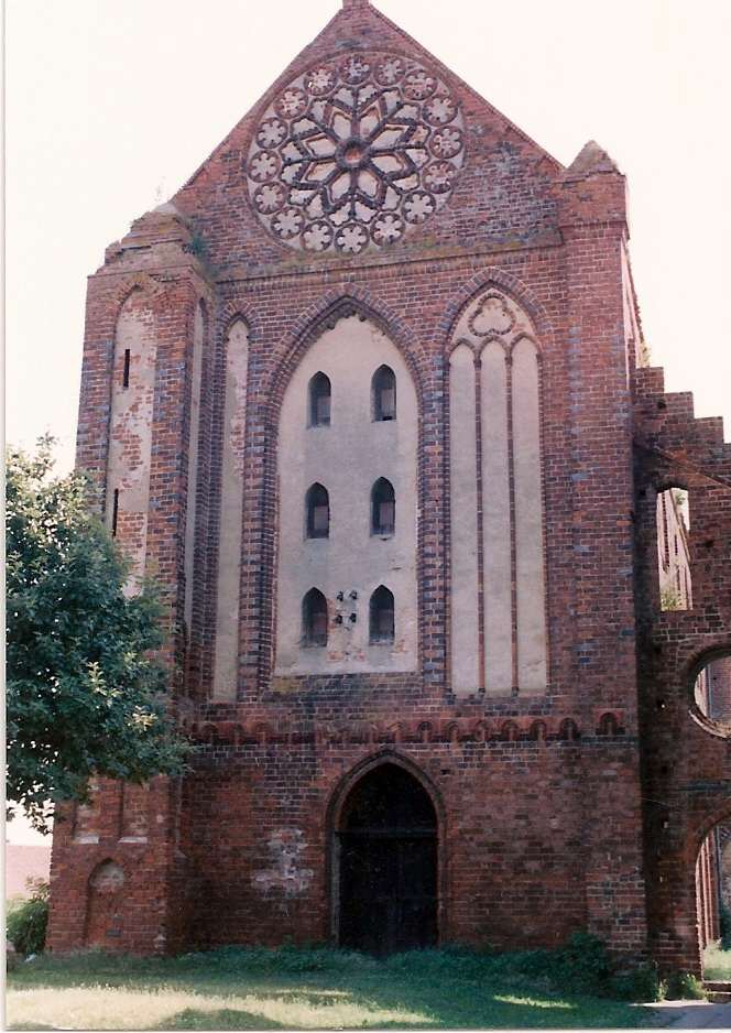 Kościół w Kołbaczu